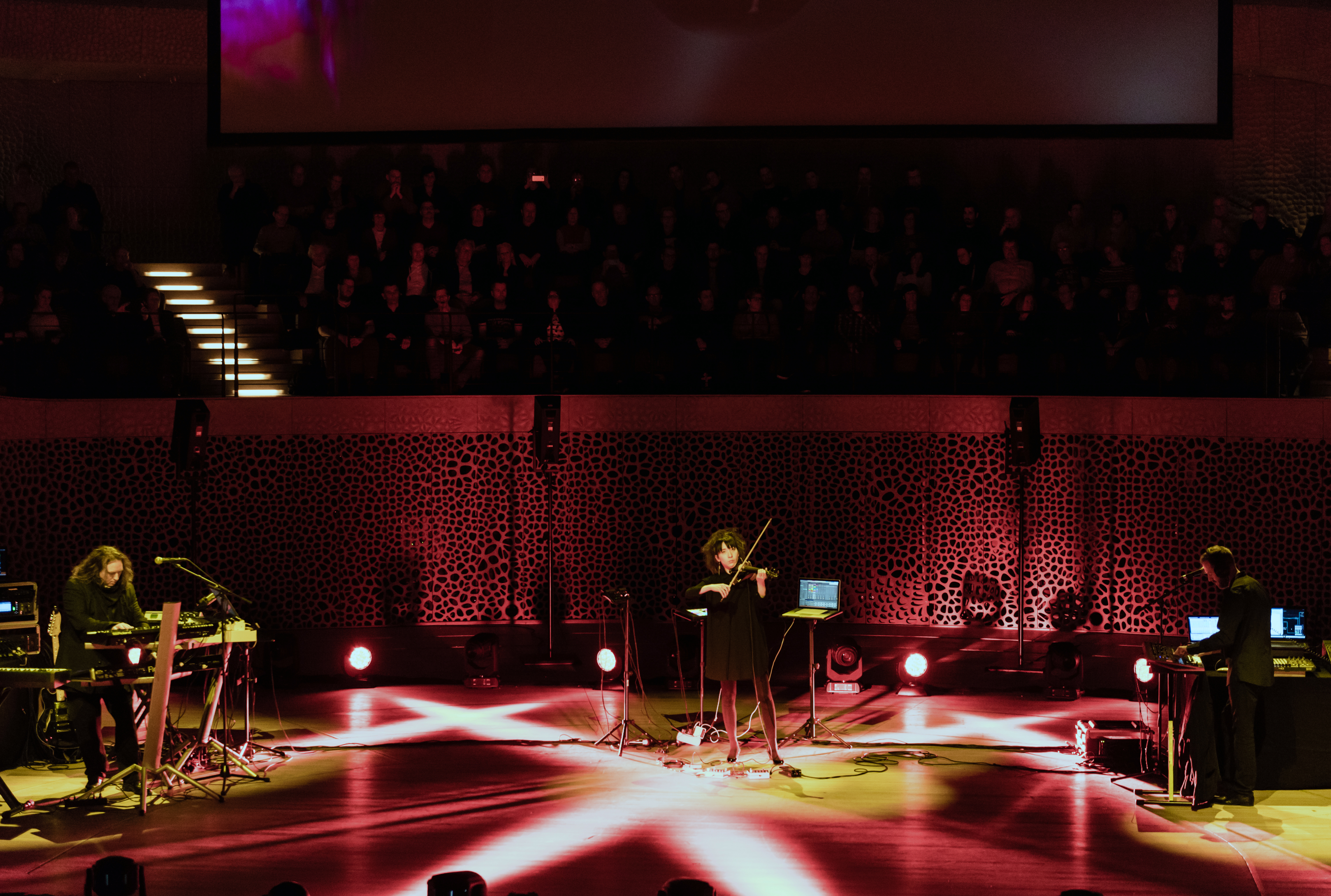 Tangerine Dream bei der Quantum of Electronic Evolution Tour in der Elbphihamonie Hamburg 2018